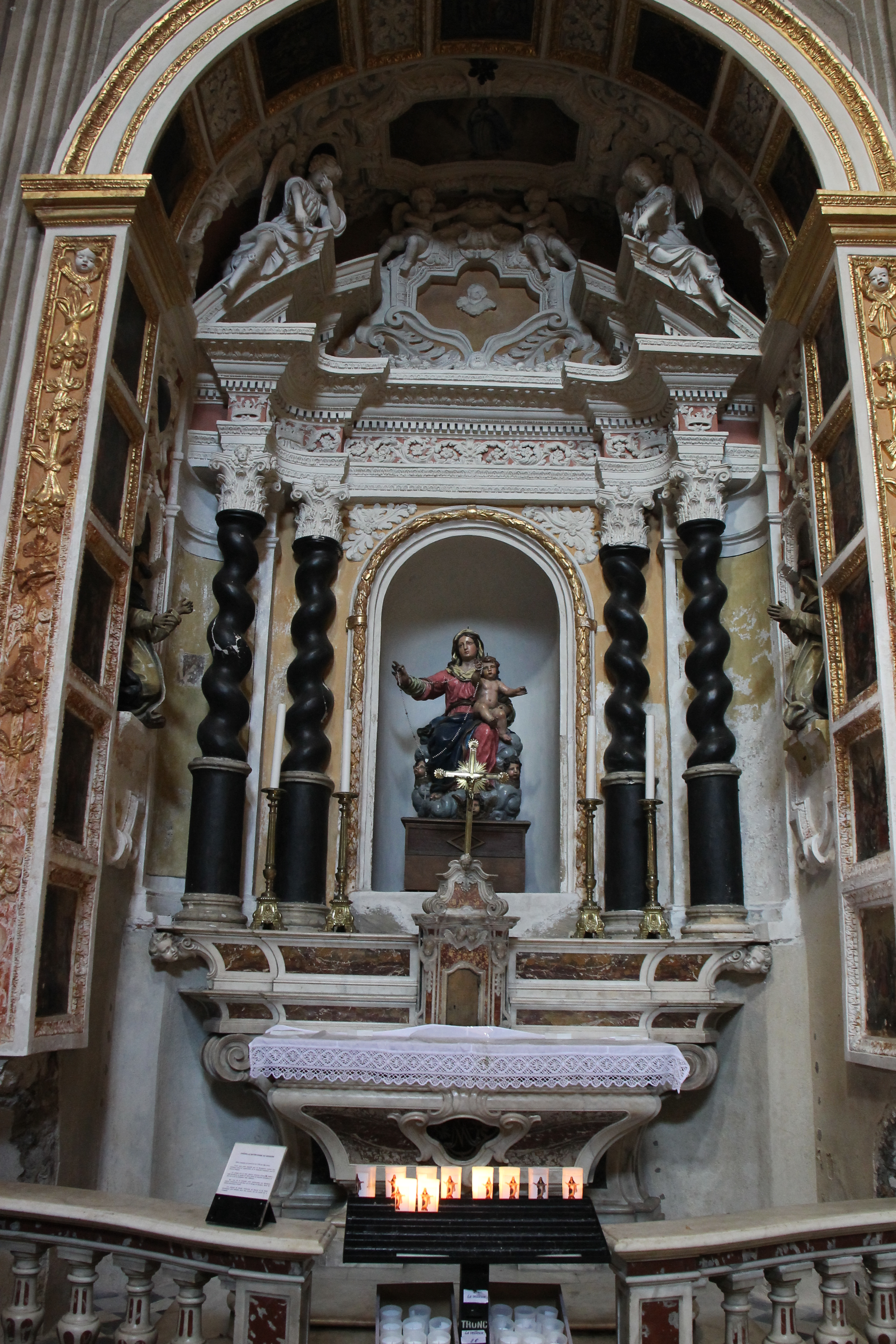 Kathedraal van Ajaccio - Kapel van Onze-Lieve-Vrouw van de Heilige Rozenkrans